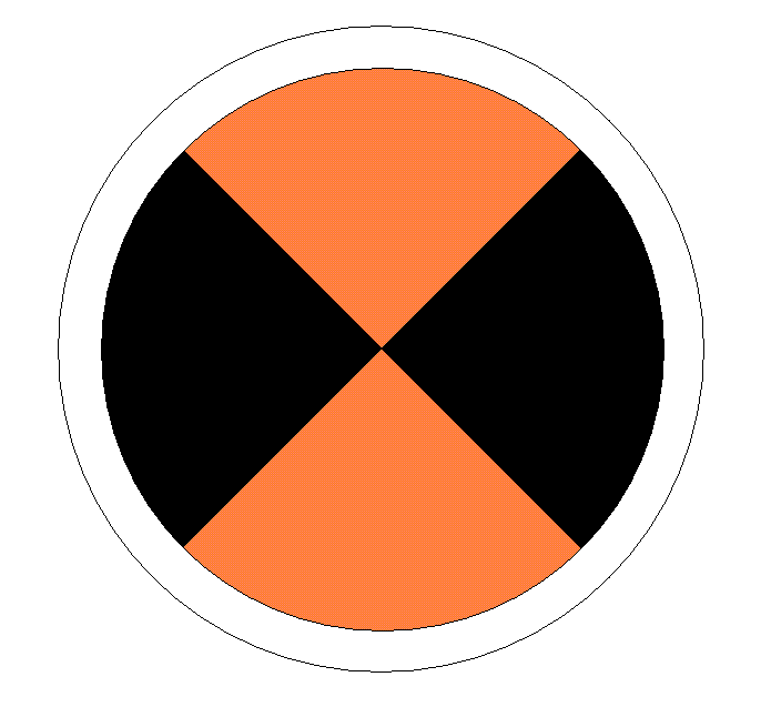 Tabella indicante treno a composizione bloccata, secondo regolamento RFI